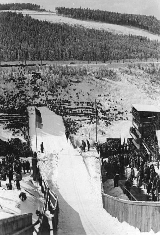 Zentralbild Wlocka 2.3.1954 V. Wintersport-Meisterschaften der Deutschen Demokratischen Republik vom 25. - 28.2.1954 in Oberhof Diesen Wintersportmeisterschaften kommt durch die Teilnahme von Sportlern aus Frankreich, der Volksrepublik Polen, der Ungarischen Volksrepublik und Westdeutschland besondere Bedeutung zu. Der Höhepunkt der V. Wintersportmeisterschaften war der Spezialsprunglauf mit internationaler Besetzung auf der Thüringenschanze am 28.2.1954. Unter den zahlreichen Ehrengästen befand sich auch der Präsident der Volkskammer der Deutschen Demokratischen Republik Dr. h.c. Johannes Dieckmann. UBz: Die Thüringenschanze während des Spezialsprunglaufes.